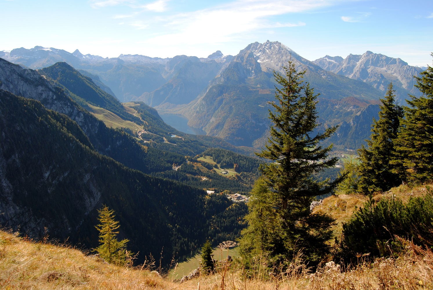 Bavarijos alpės